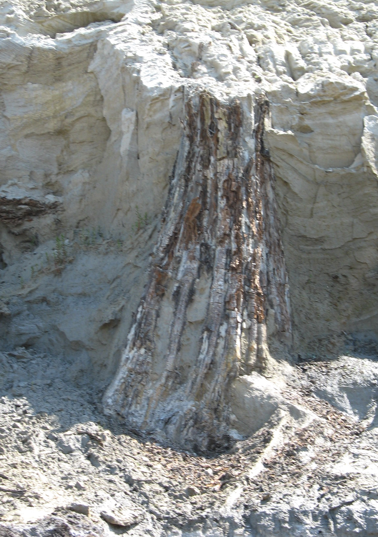 A visontai lignitkülfejtés fedőrétegében feltárt megkövesedett fatörzs